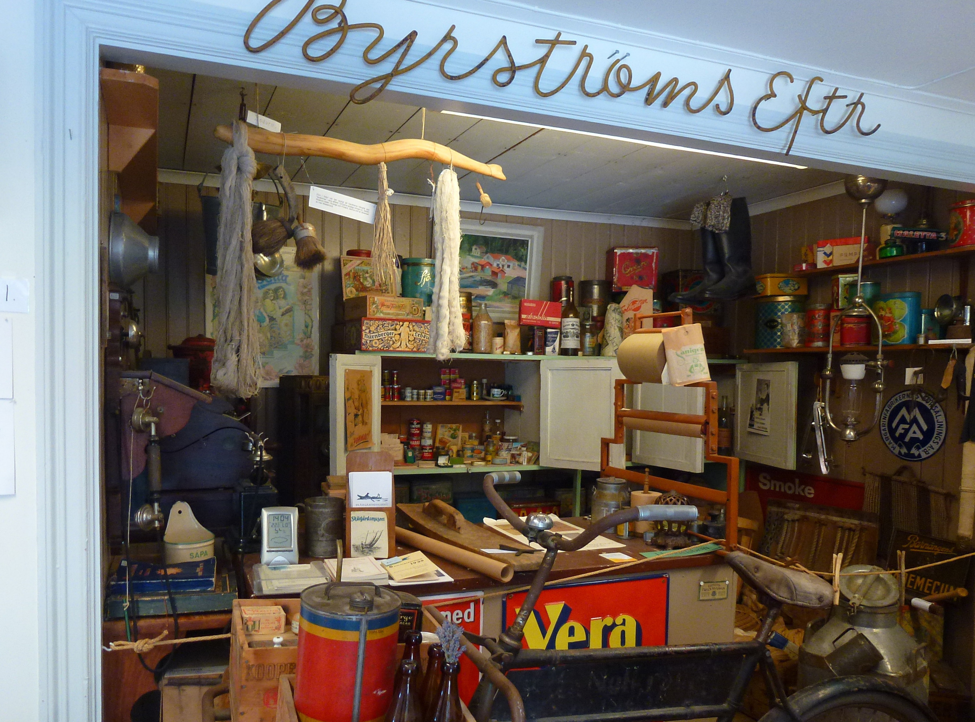 Stavsnäs Skärgårdsmuseum